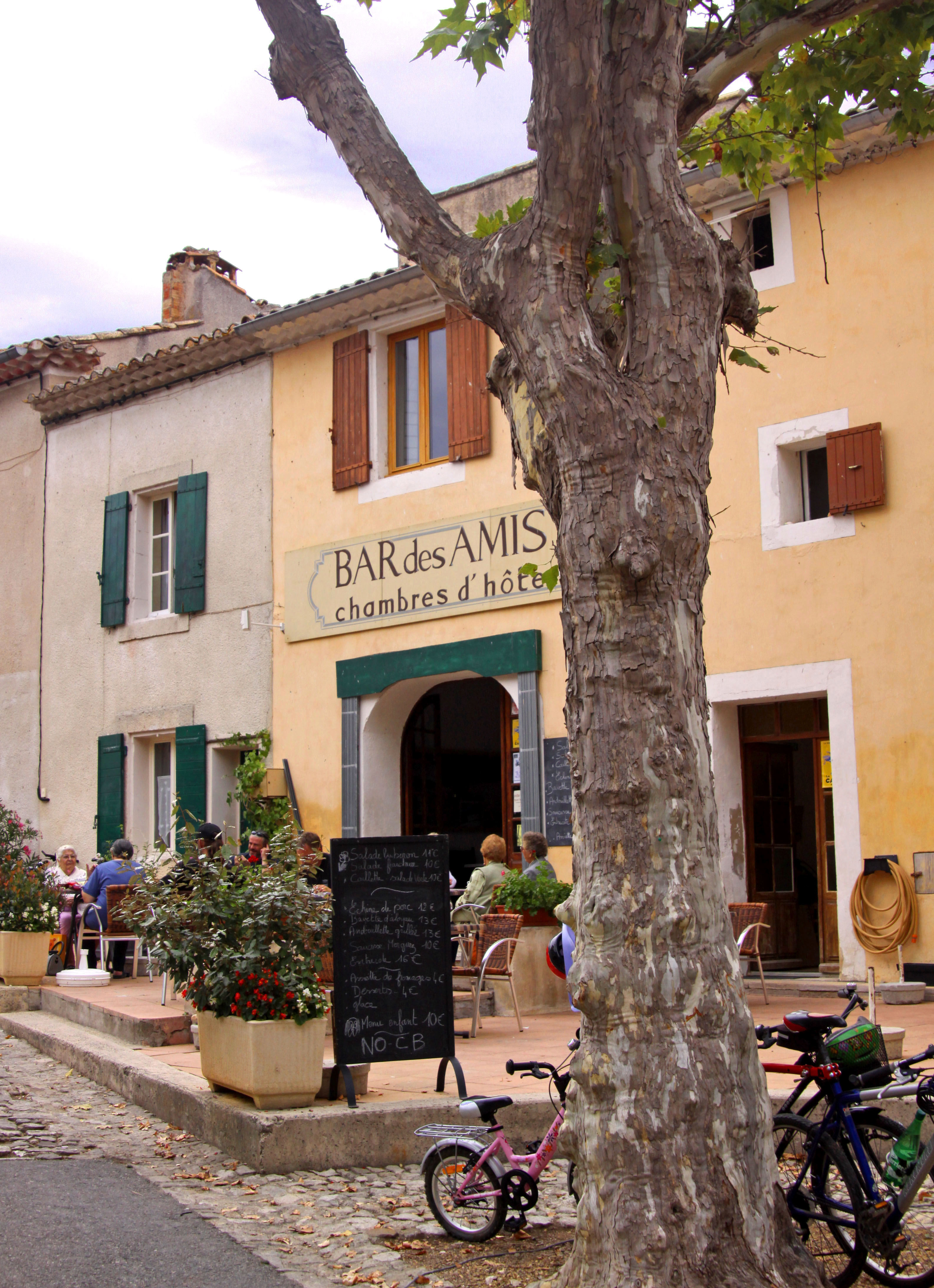 Bar des Amis à Villars